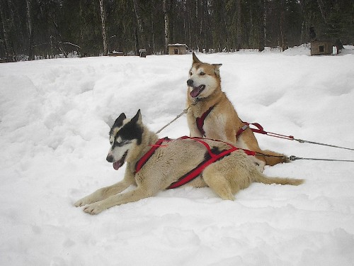 Two Alaskan Huskies at a race